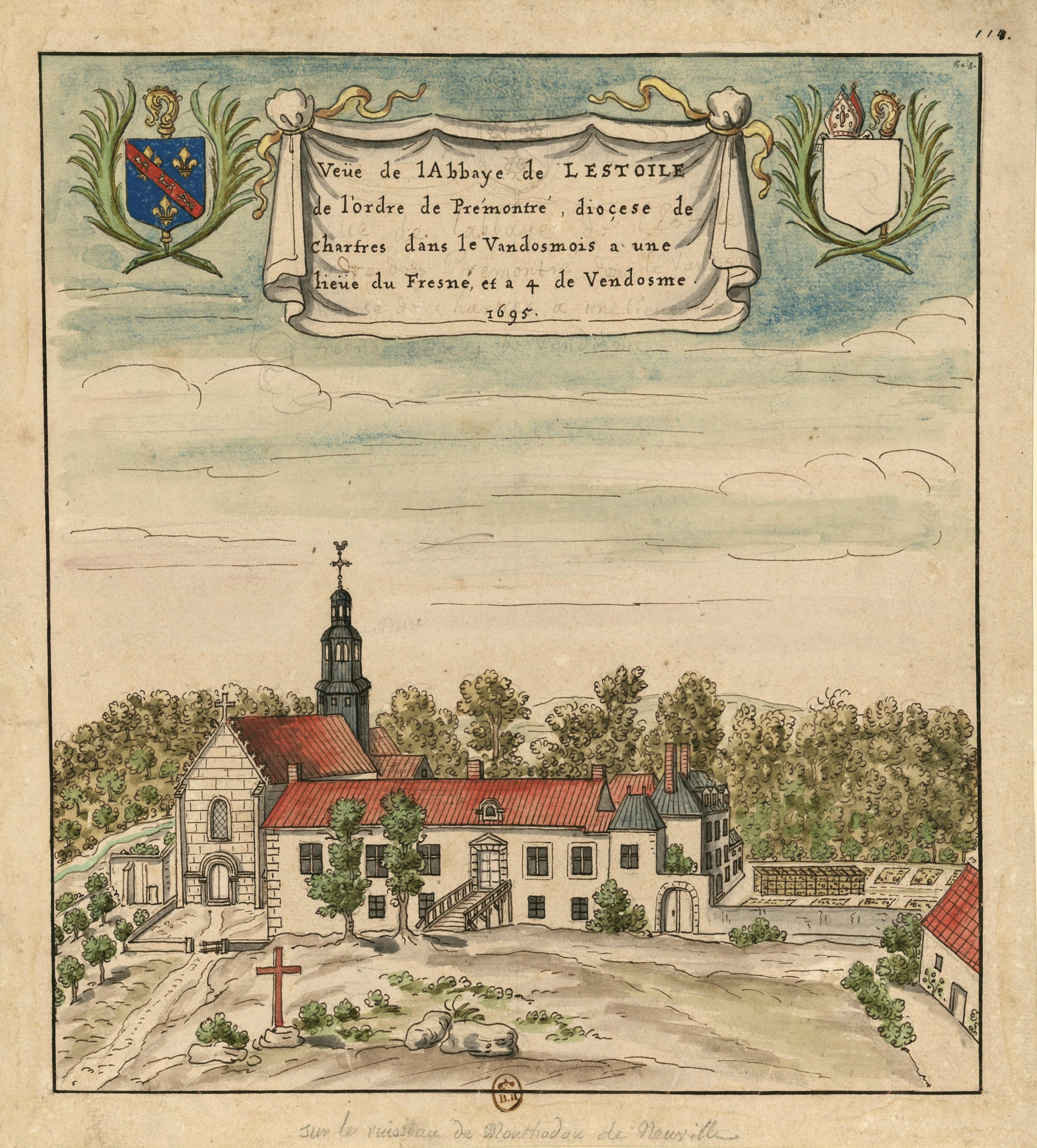 Abbaye de l'Étoile à Authon (Loir-et-Cher, France), en 1695 .